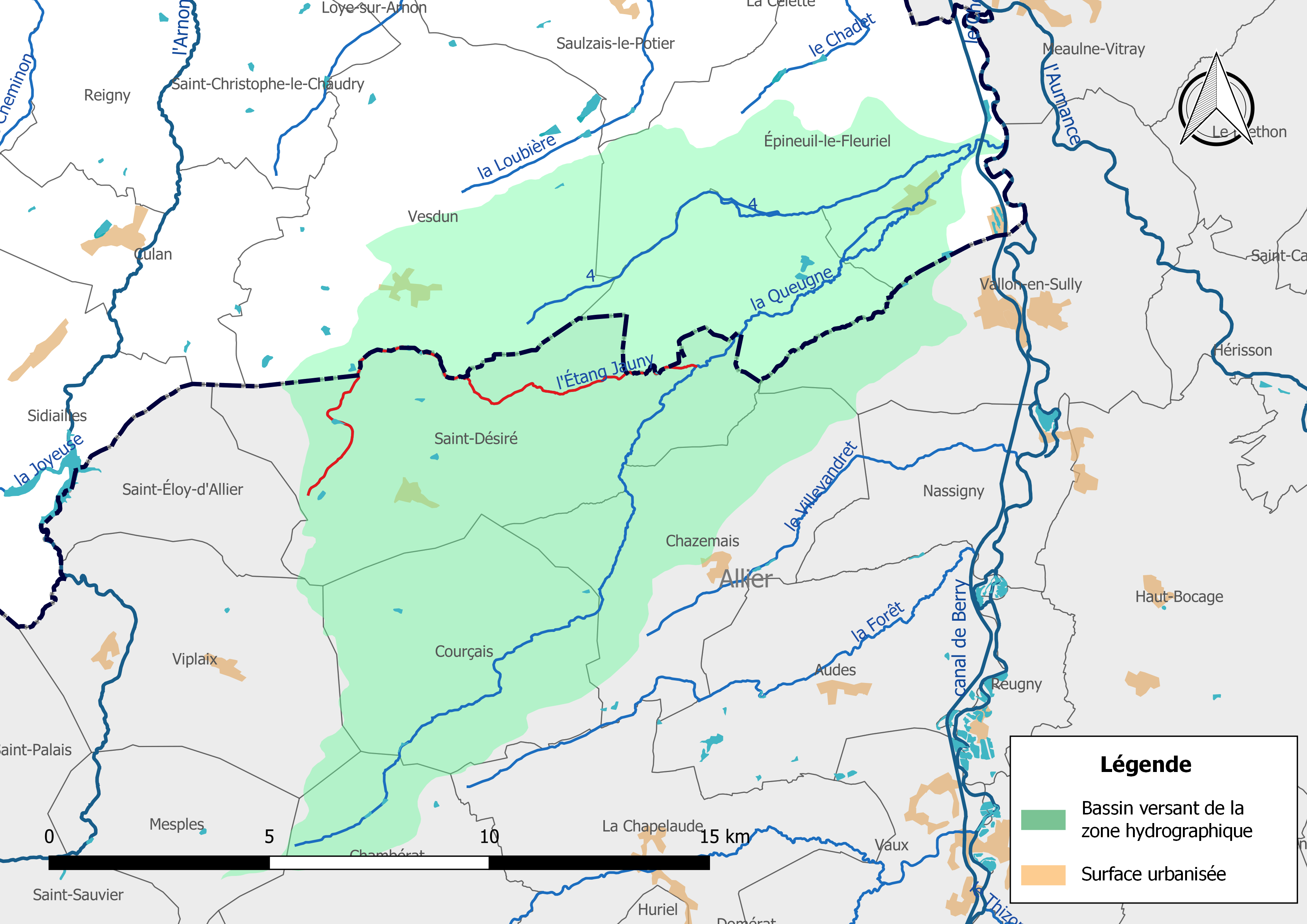 Carte du cours d'eau « Étang Jauny » (France) et de la zone hydrographique dans laquelle il s'insère.